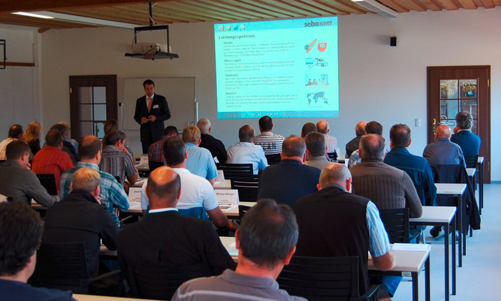 Vortrag während einer Schulung in Baunach